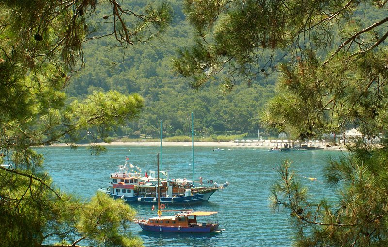 Kemer